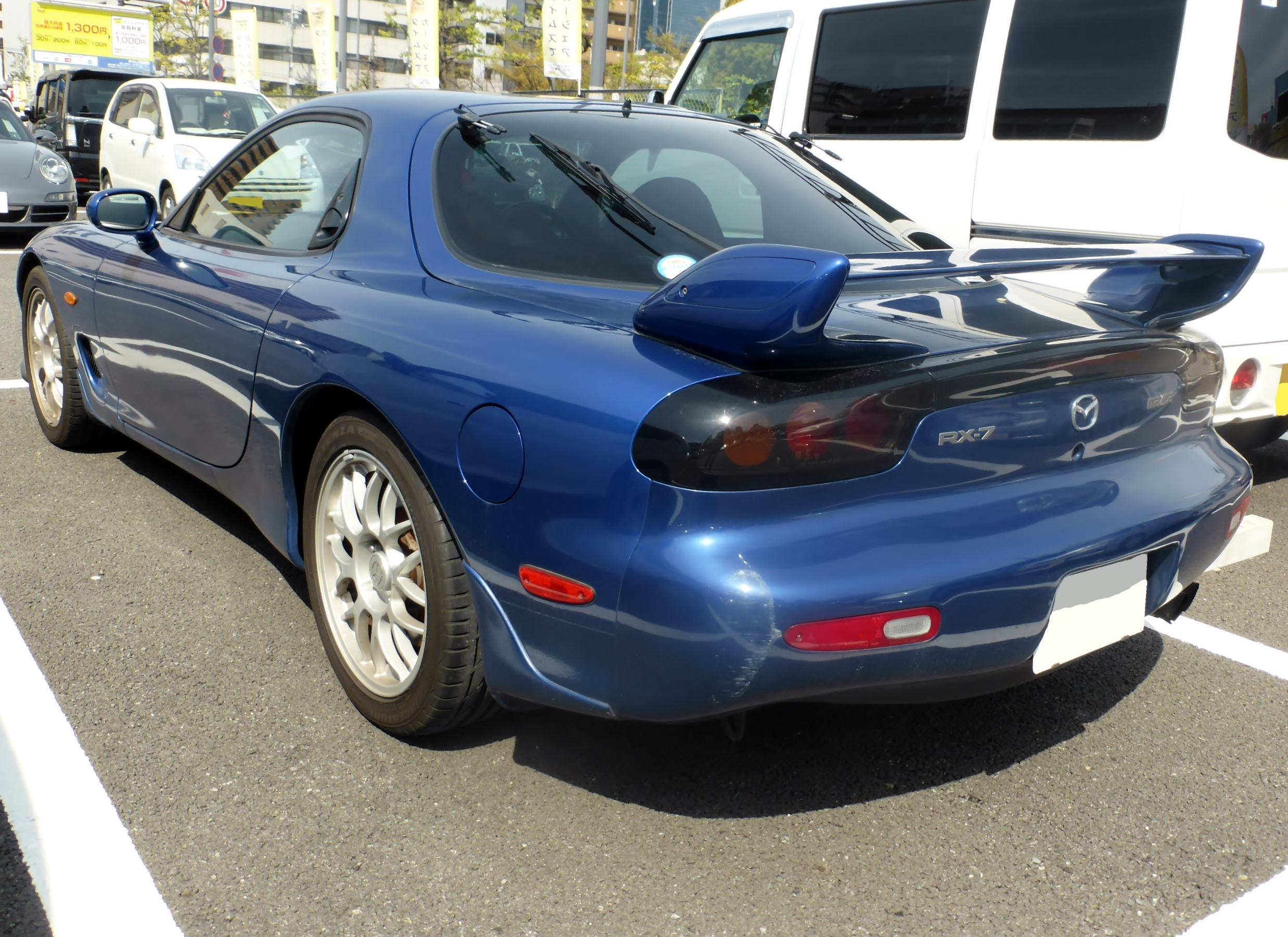 FD3S型マツダ・RX-7をリアから撮影。